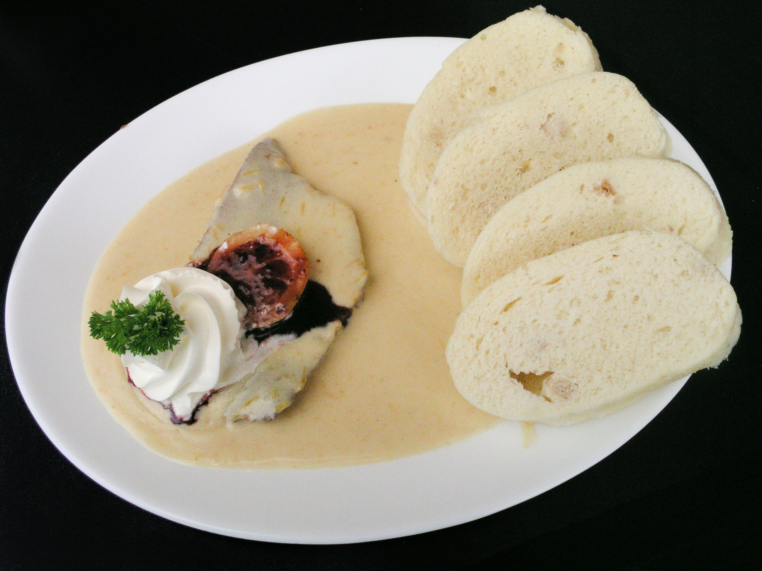 Svíčková na smetaně, houskový knedlík, citron, brusinky